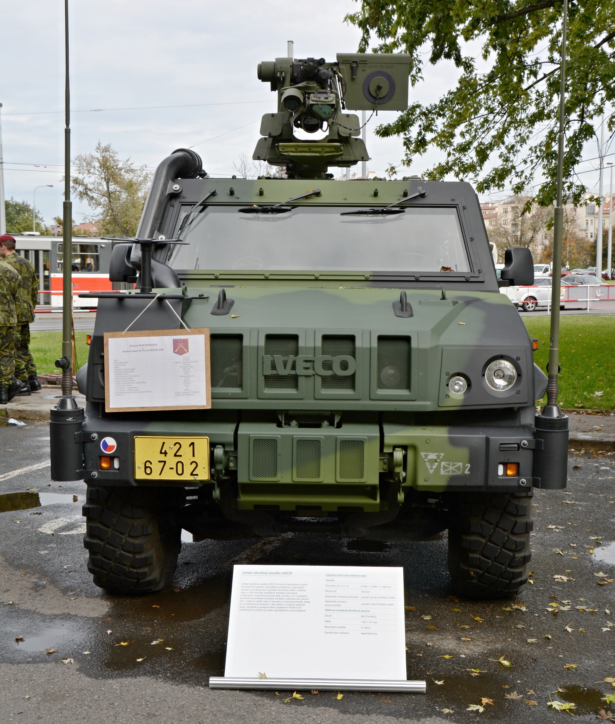 Lehké obrněné vozidlo IVECO 4x4 se zbraňovou stanicí M 151 A2 PROTECTOR s kulometem MI.50 M2HB QCB z výzbroje Armády České republiky. Vystaveno 14. října 2014 při příležitosti oslav 95. výročí vzniku Generálního štábu AČR.